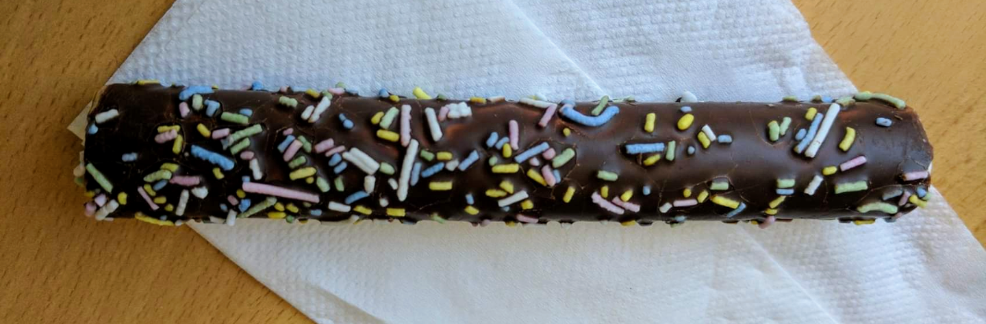 Krokofant, en svensk godisklassiker.